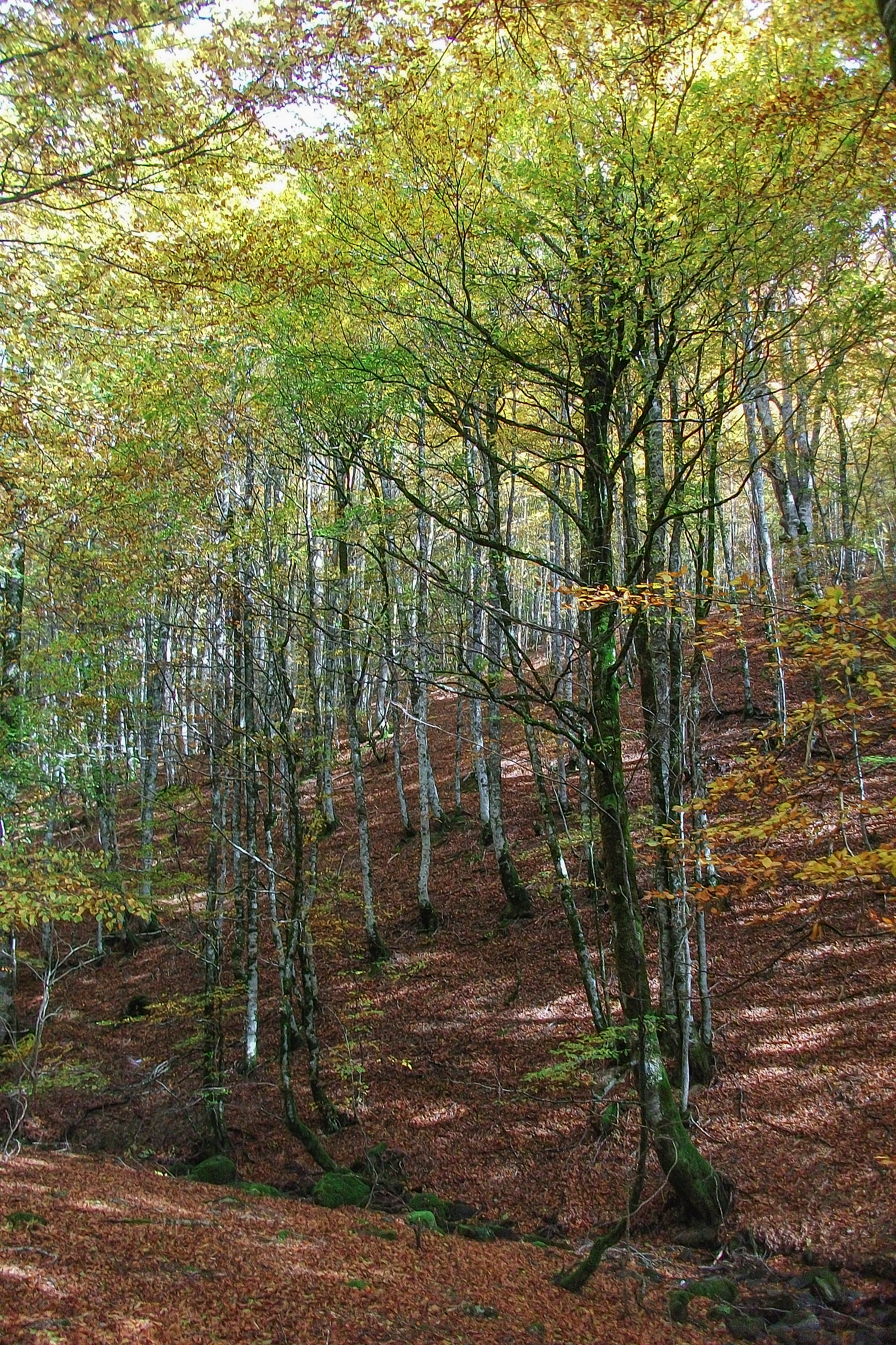 Hayedo de Irati, poco antes de la caída de hoja